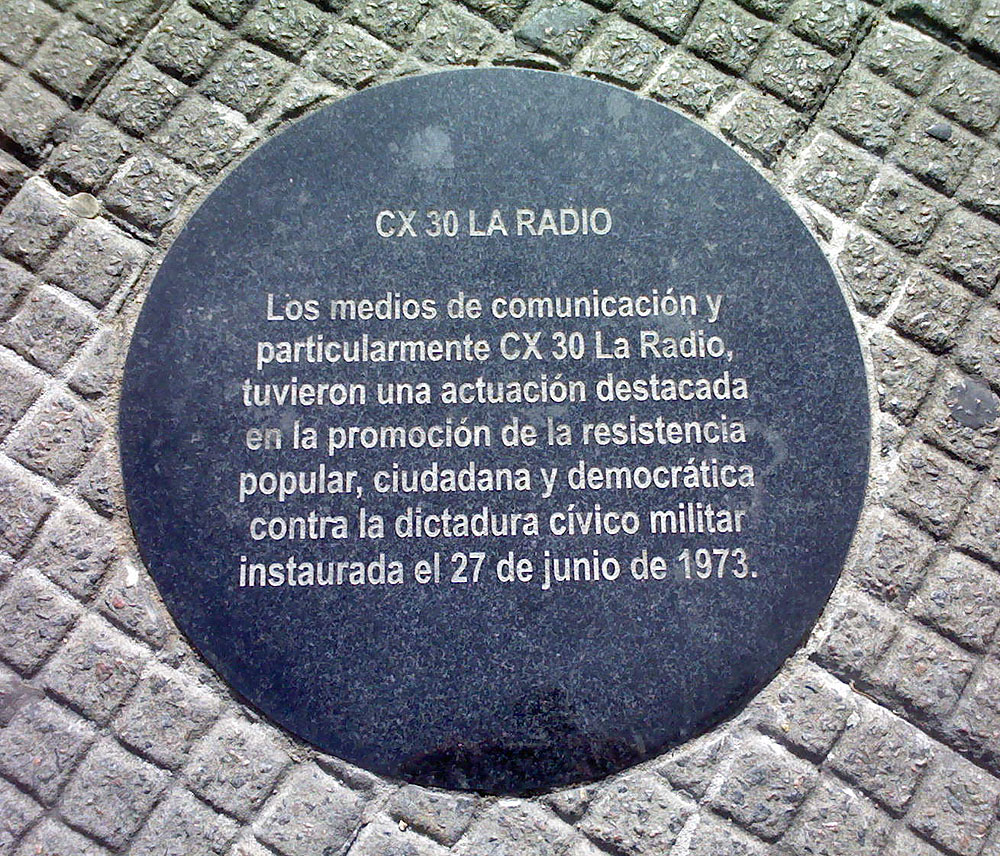 Marca de la memoria en la esquina del palacio Salvo, frente a la plaza Independencia (Montevideo)